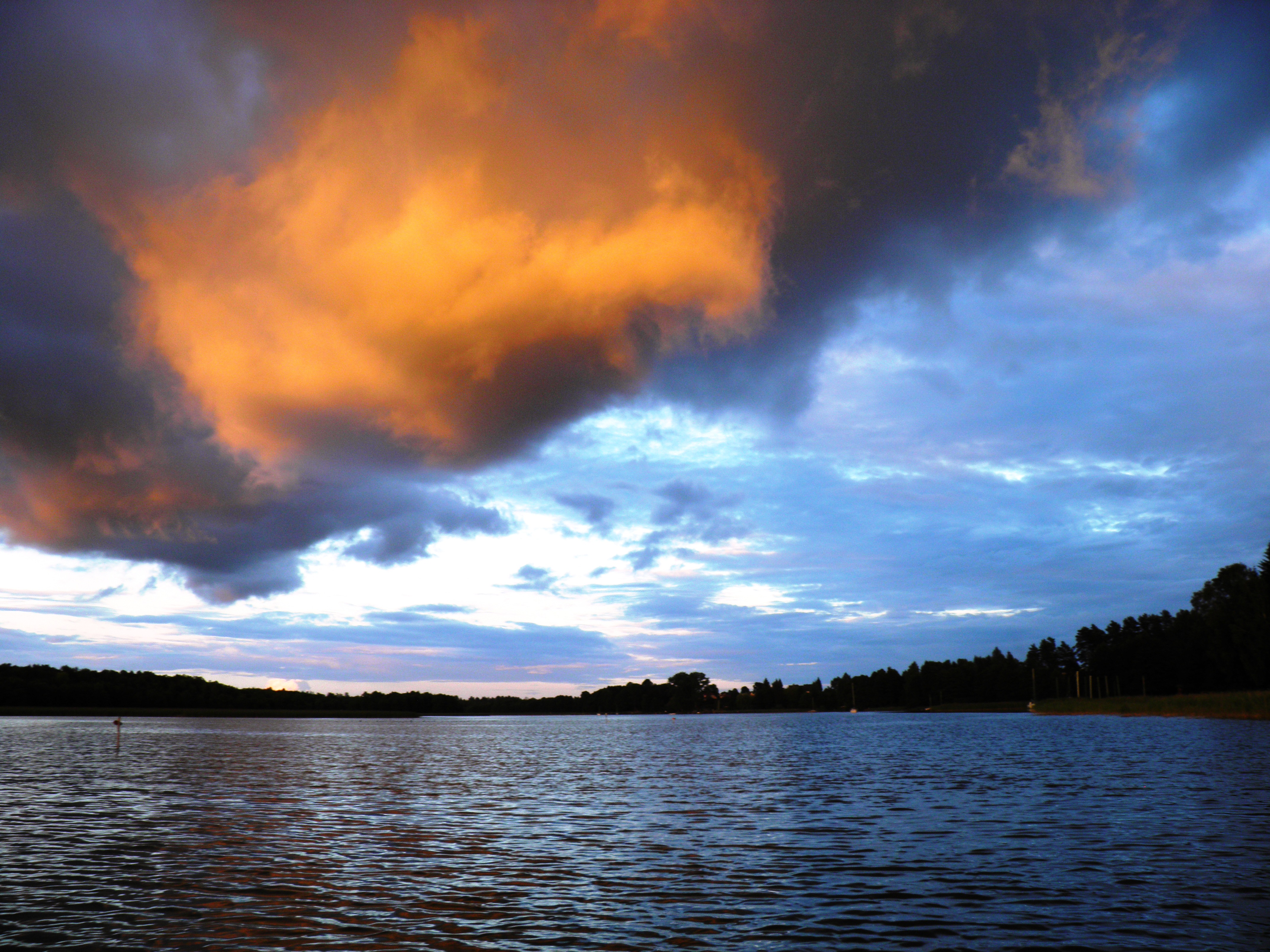 Obszar specjalnej ochrony ptaków Puszcza Augustowska. This is a photography of Natura 2000 protected area with ID PLB200002